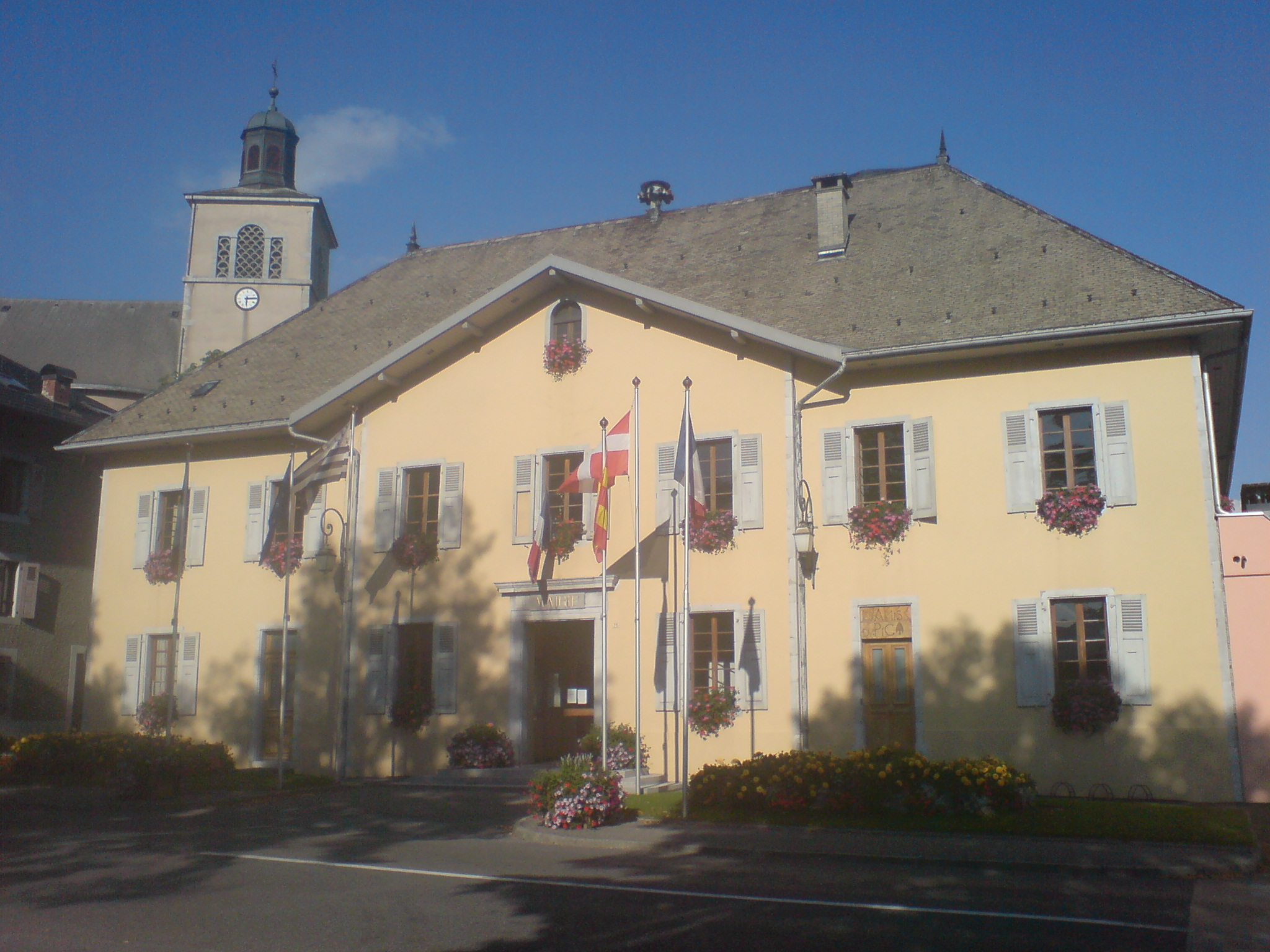 Façade de la mairie de Taninges